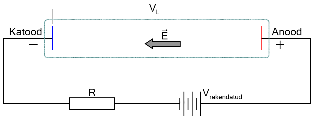 Silindrilise konstruktsiooniga katseseade plasma tekitamiseks